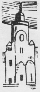 Беларуская (тарашкевіца): Полацак (Połacak), Сафія